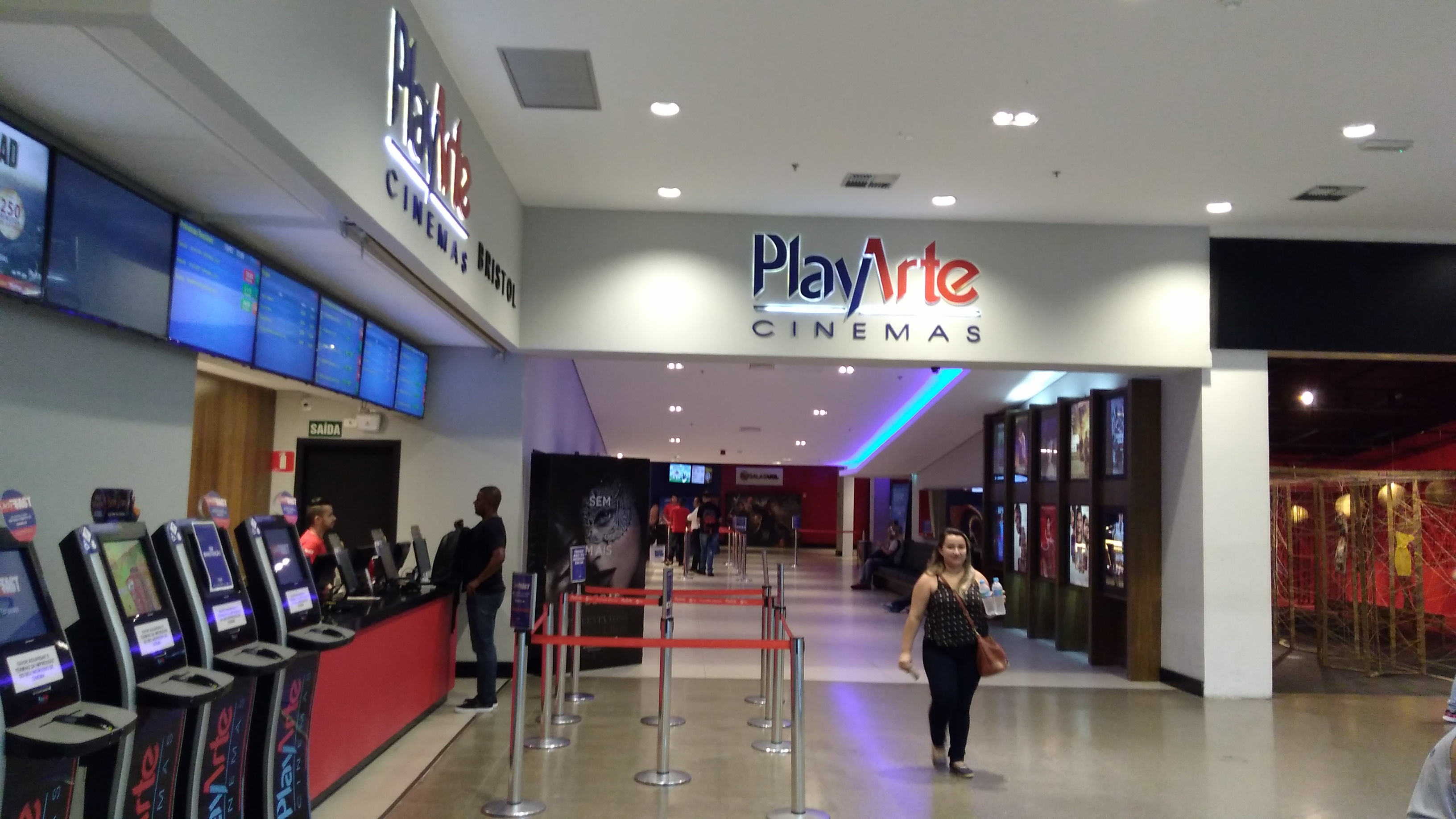 Vista da entrada do PlayArte Bristol de São Paulo, SP